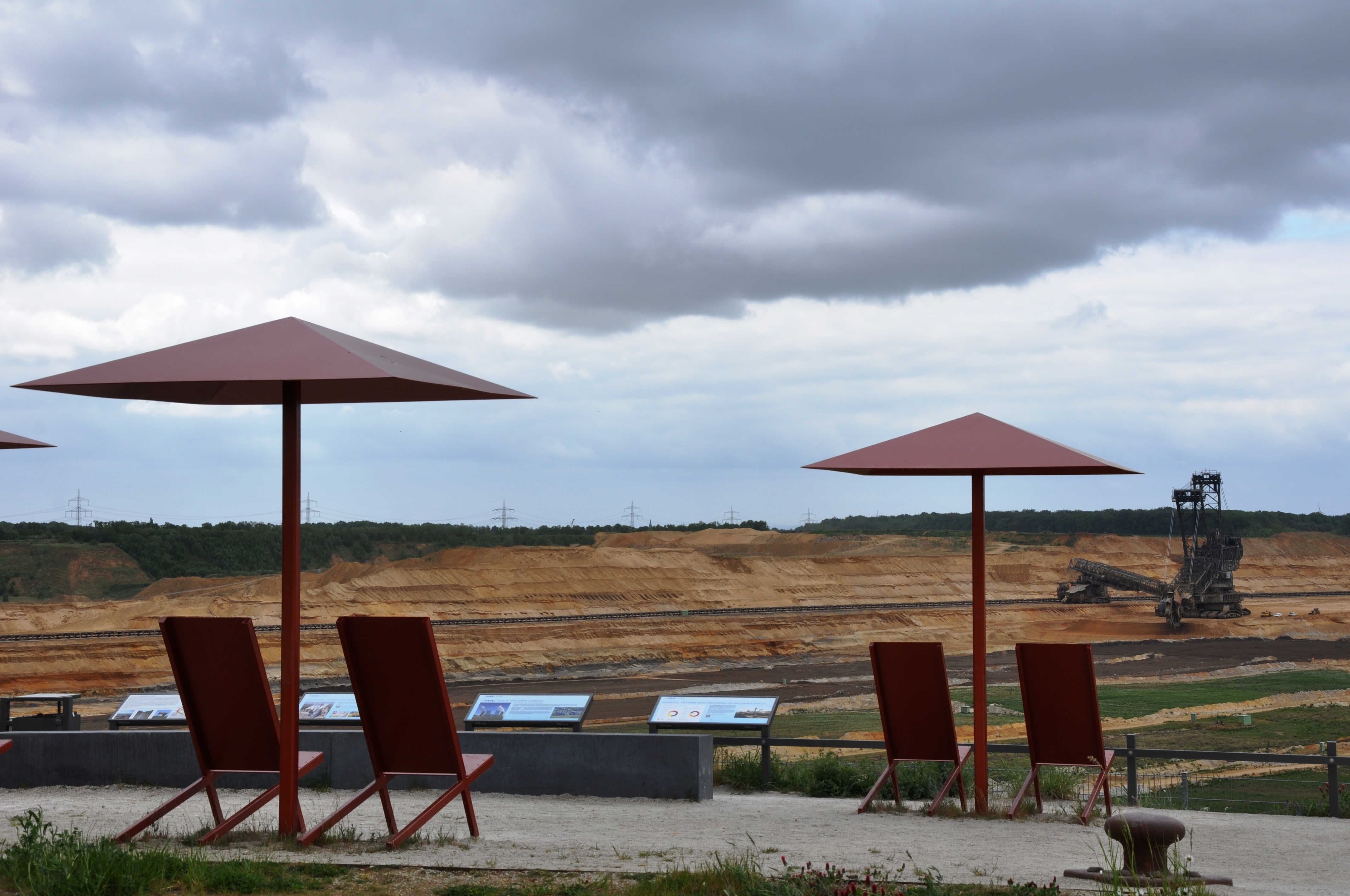 Aussicht von Terra Nova, Schaufelradbagger im Tagebau Hambach